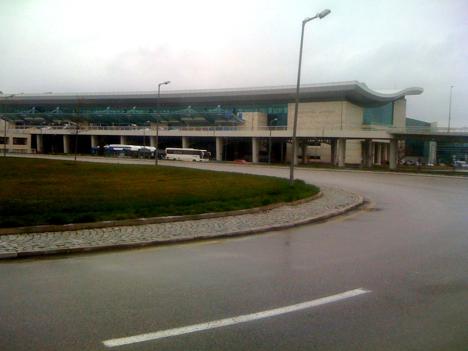 Ankara airport